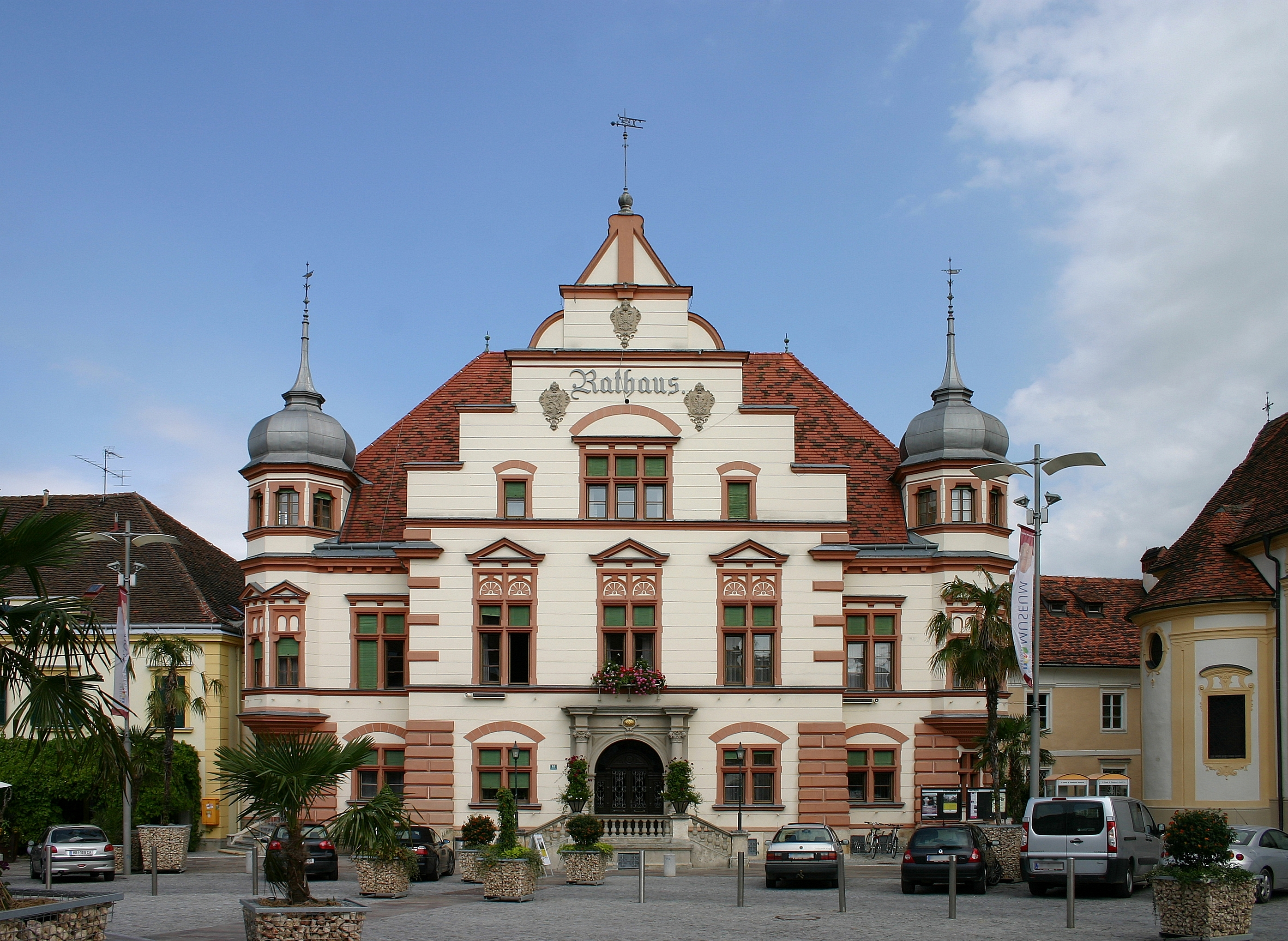 Hartberg in der (Steiermark) Rathaus